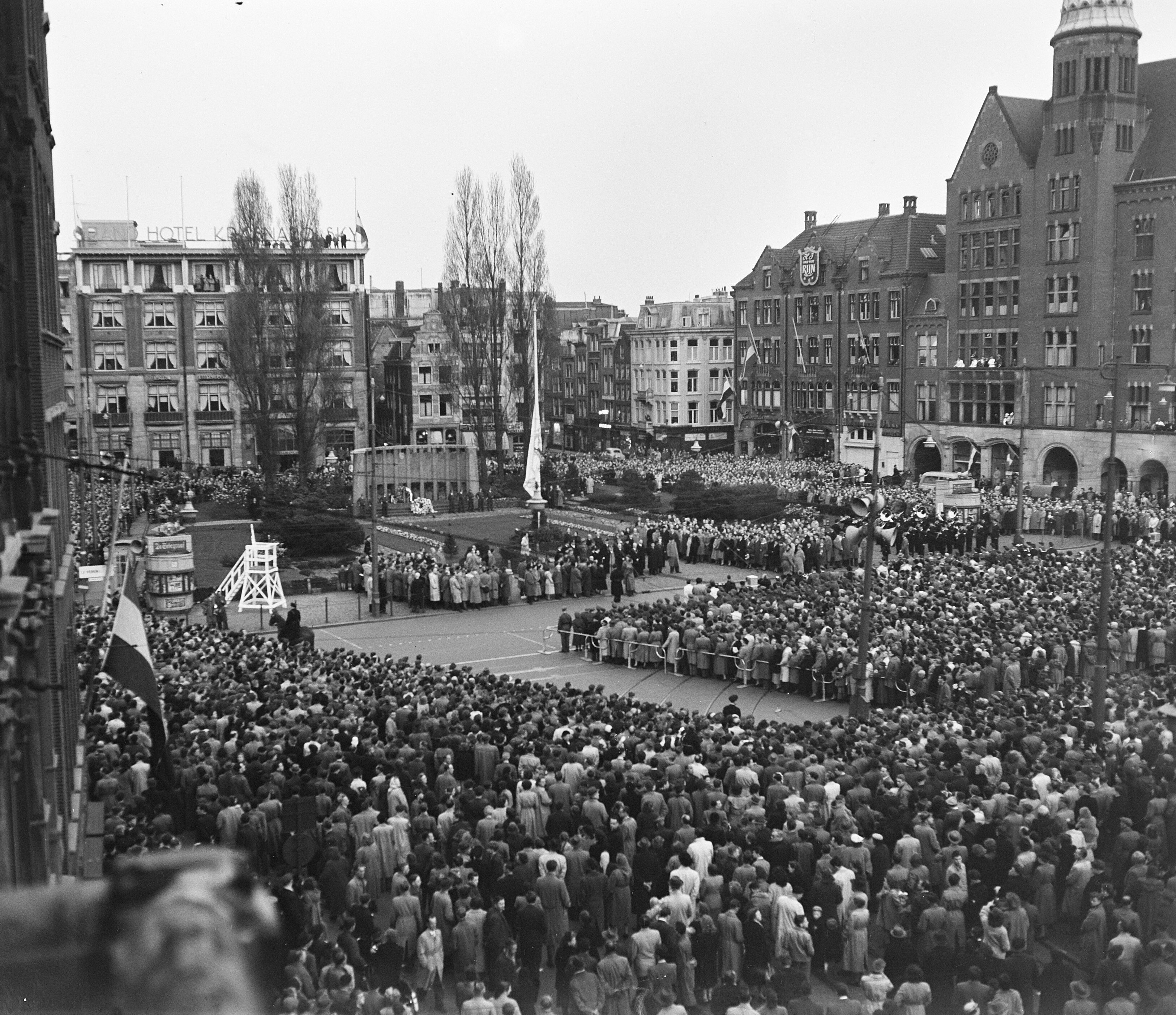 Collectie / Archief : Fotocollectie Anefo Reportage / Serie : [ onbekend ] Beschrijving : 4 mei dodenherdenking , overzichten herdenking Dam Datum : 4 mei 1954 Locatie : Amsterdam, Noord-Holland Trefwoorden : HERDENKINGEN, OVERZICHTEN Fotograaf : Rossem, Wim van / Anefo Auteursrechthebbende : Nationaal Archief Materiaalsoort : Glasnegatief Nummer archiefinventaris : bekijk toegang 2.24.01.09 Bestanddeelnummer : 906-4474